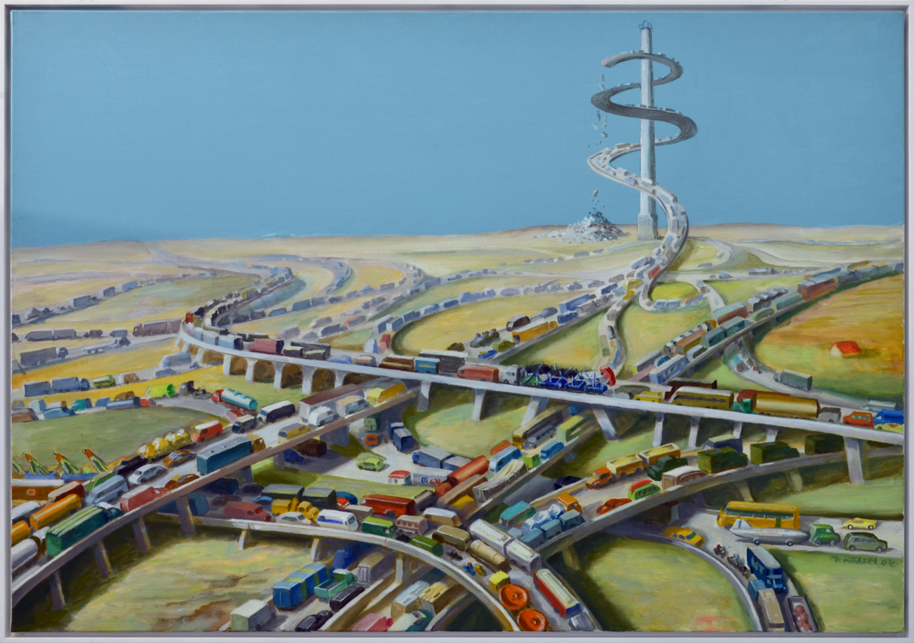 Milan Ressel, Měli jsme jet na A9 a pak se vrátit na R12 (2004)